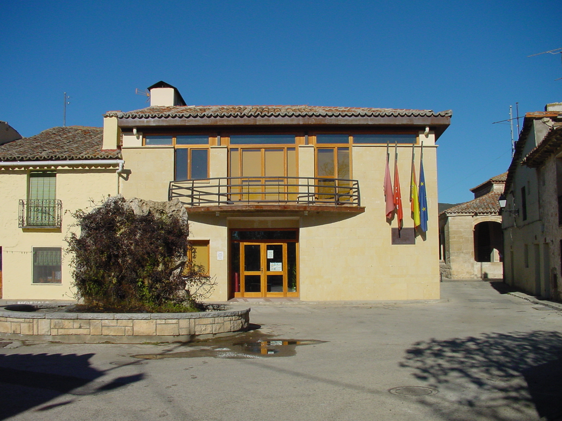 El antiguo Ayuntamiento de Torremocha de Jarama.